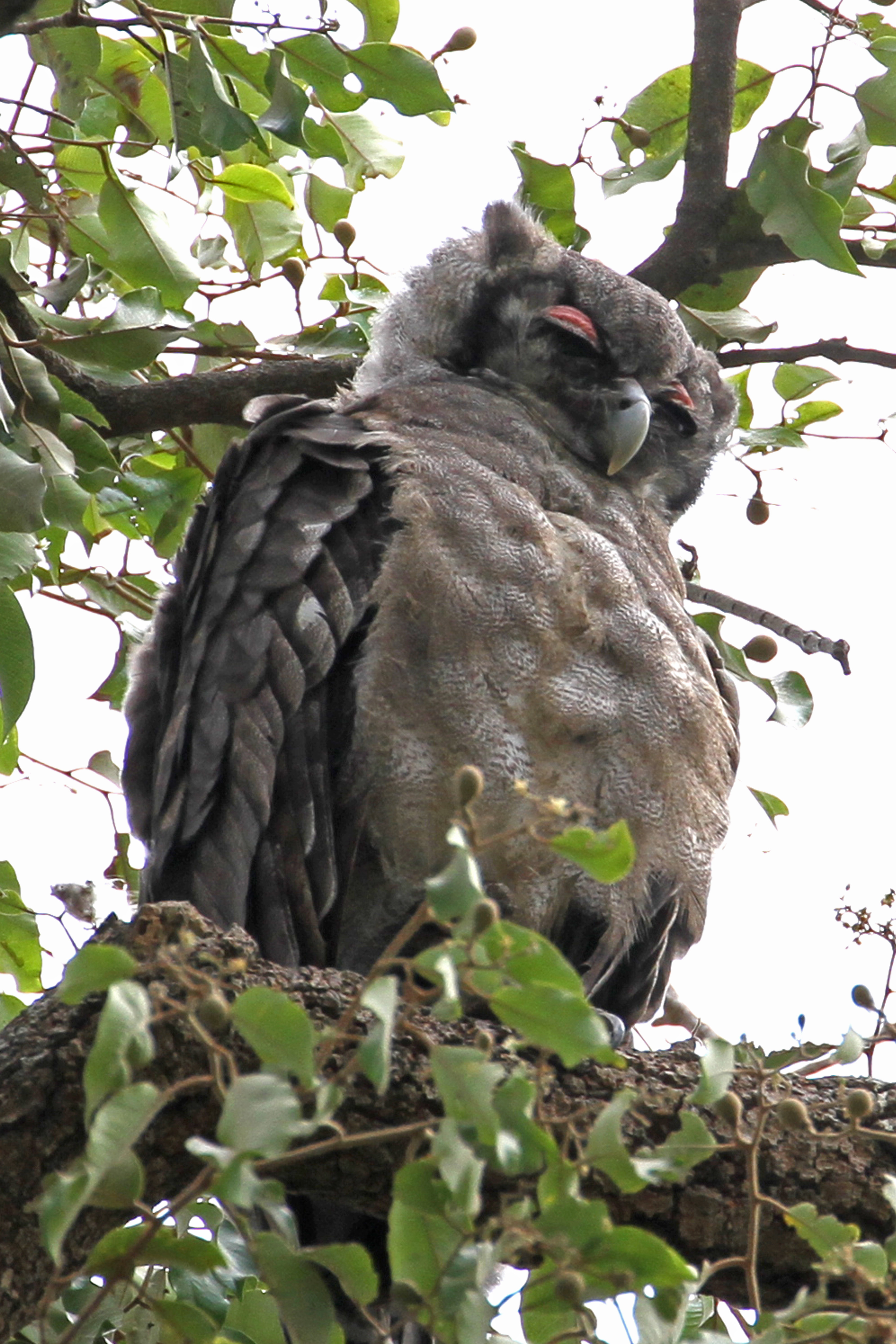 Verreaux's Eagle Owl, Gambia